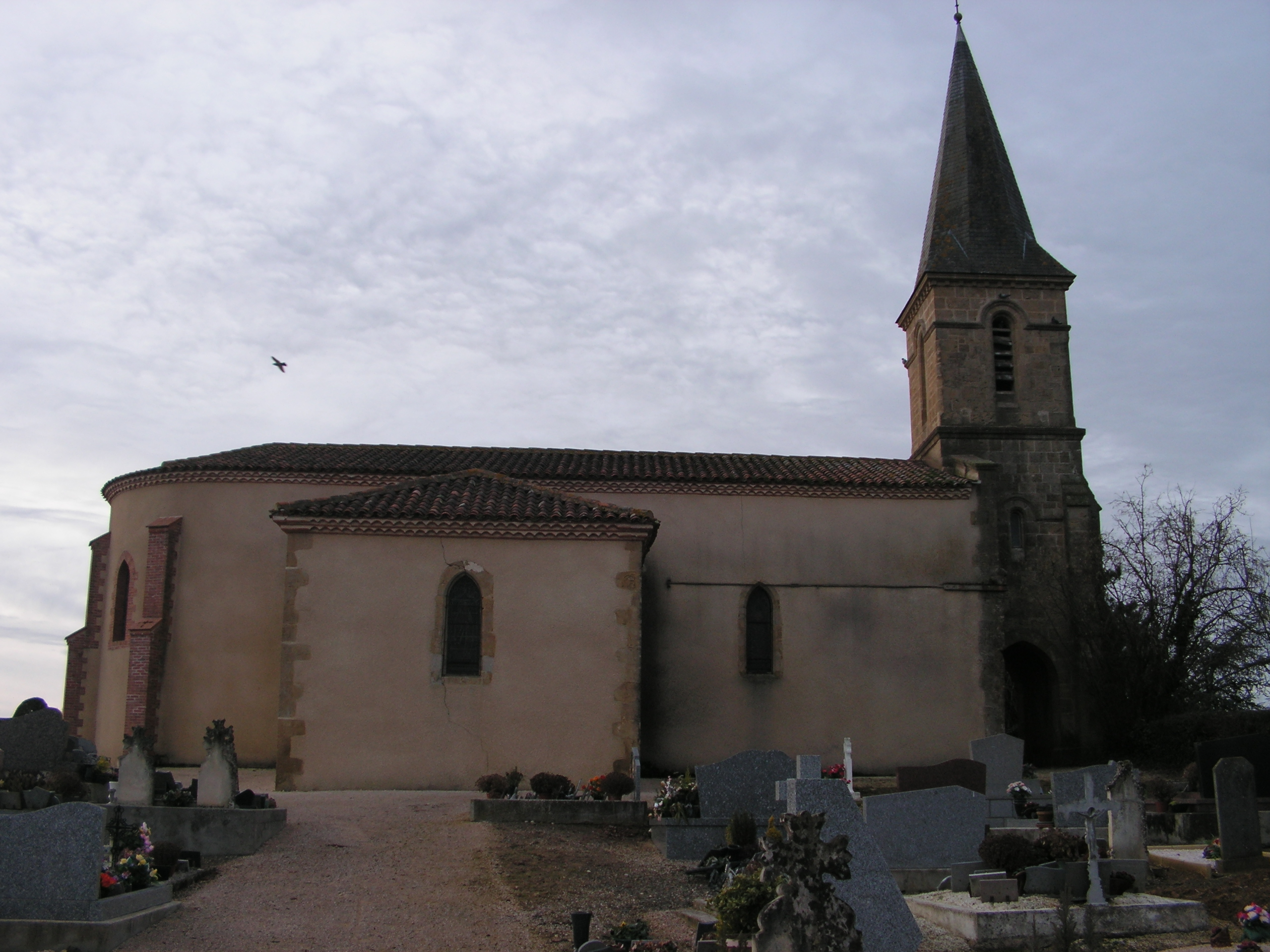 église Saint-Pierre de Bars. Vue générale depuis le cimetière